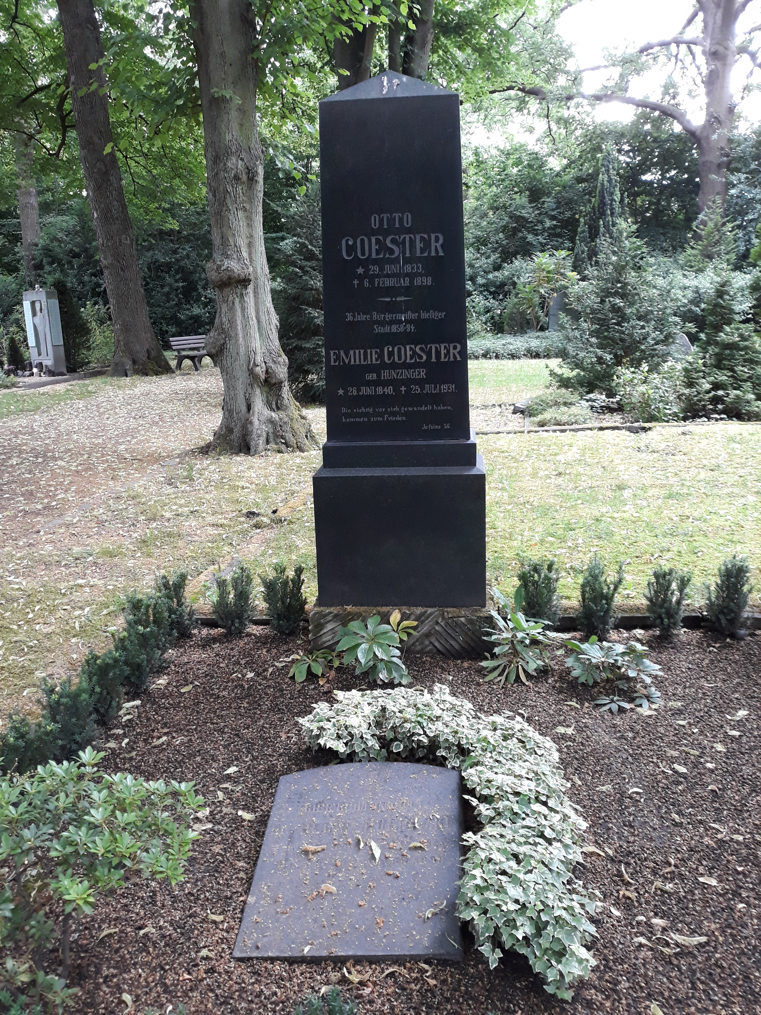 Das Grab des Soester Bürgermeisters Otto Coester auf dem Osthofenfriedhof in Soest.